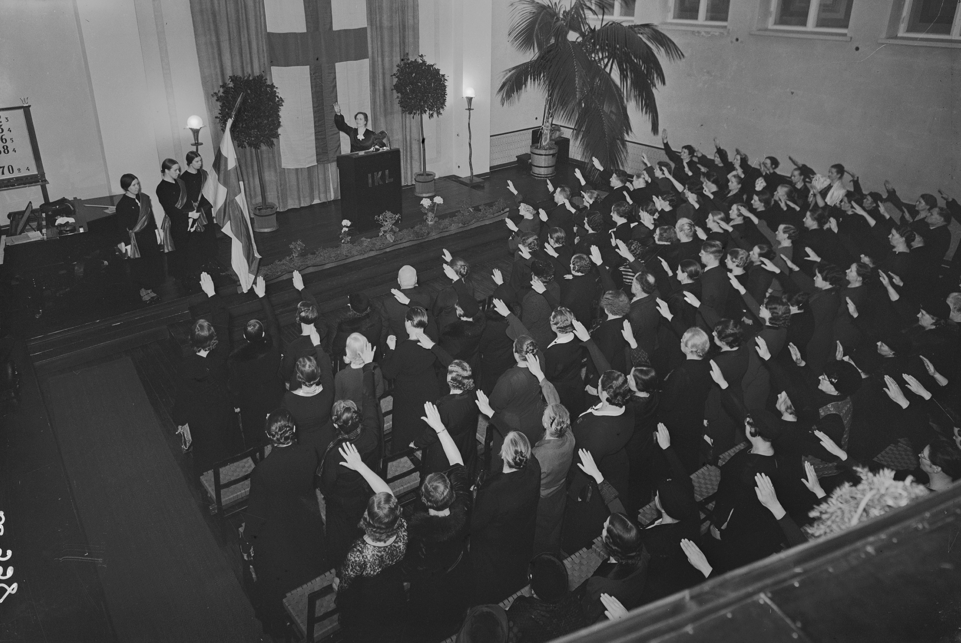 Kansanedustaja Hilja Riipinen puhumassa IKLn naisten kokouksessa Helsingissä maaliskuussa 1936.